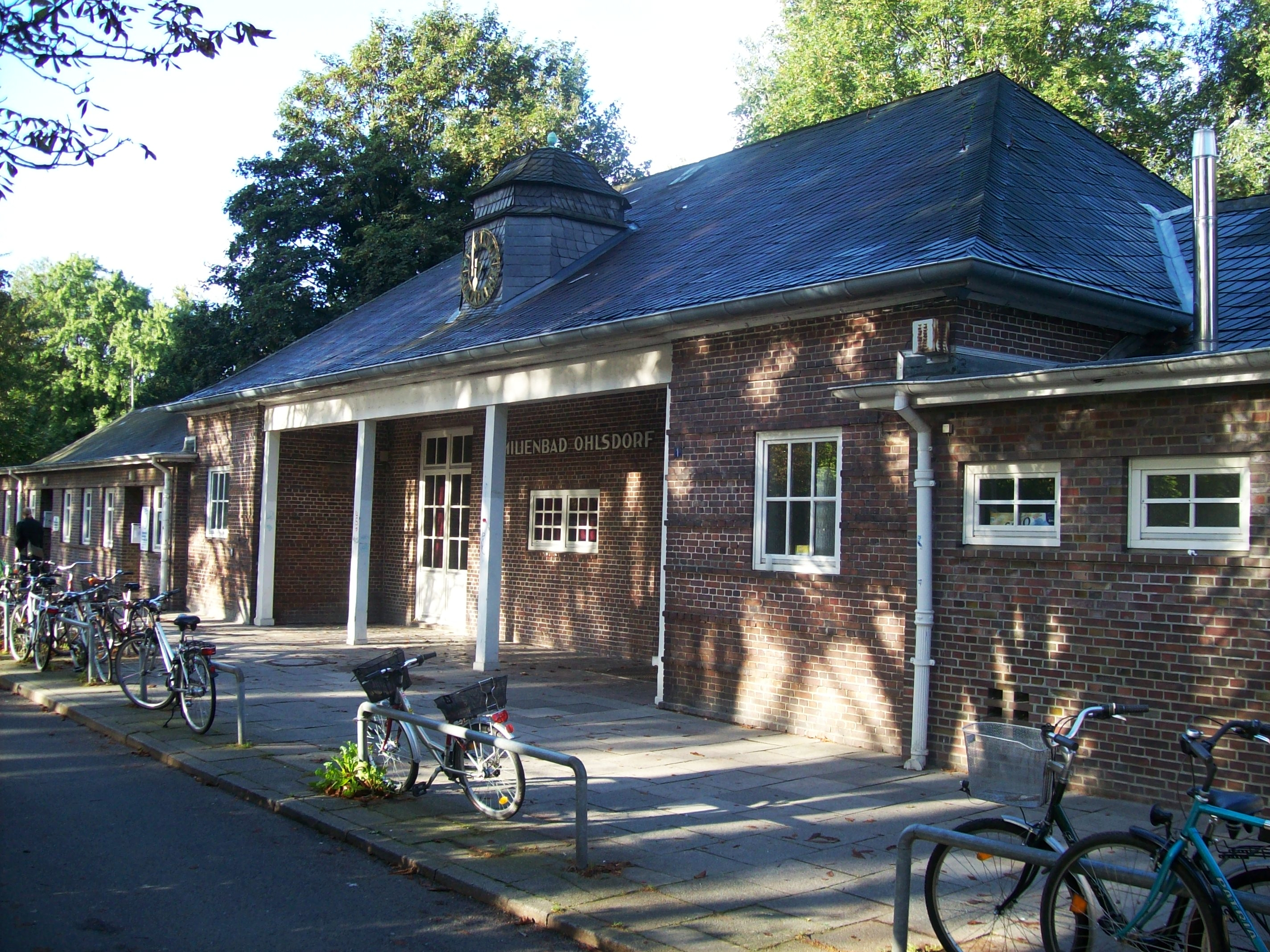 Familienbad Ohlsdorf Alter Eingang